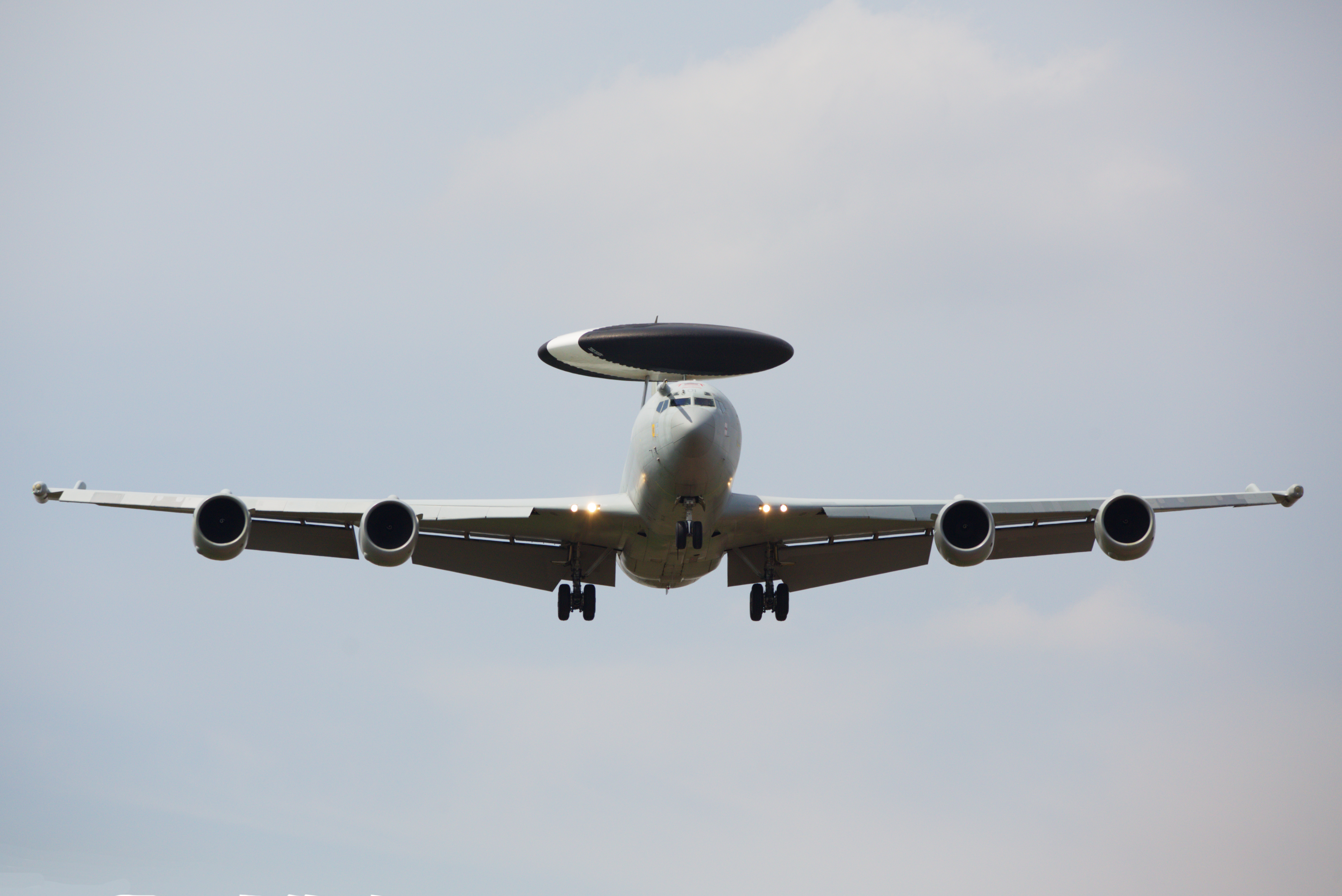 Landing at Mildenhall